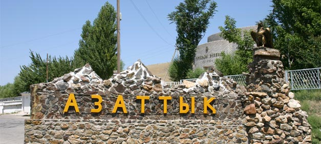 Азаттық ауылының кіре берісі (шығыстан)